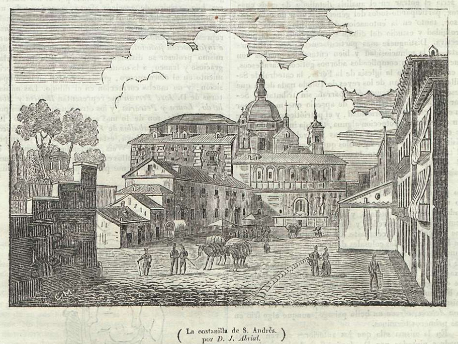 La costanilla de San Andrés, Madrid, grabado publicado en la revista española Semanario Pintoresco Español.